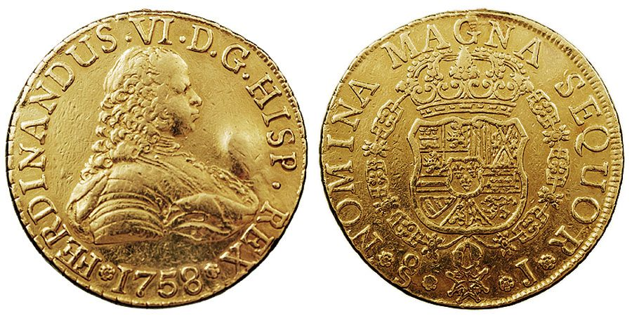 Moneda de vuit escuts encunyada en 1758 al regnat de Ferran VI d'Espanya. És una peça d'or fabricada a Santiago de Xile.